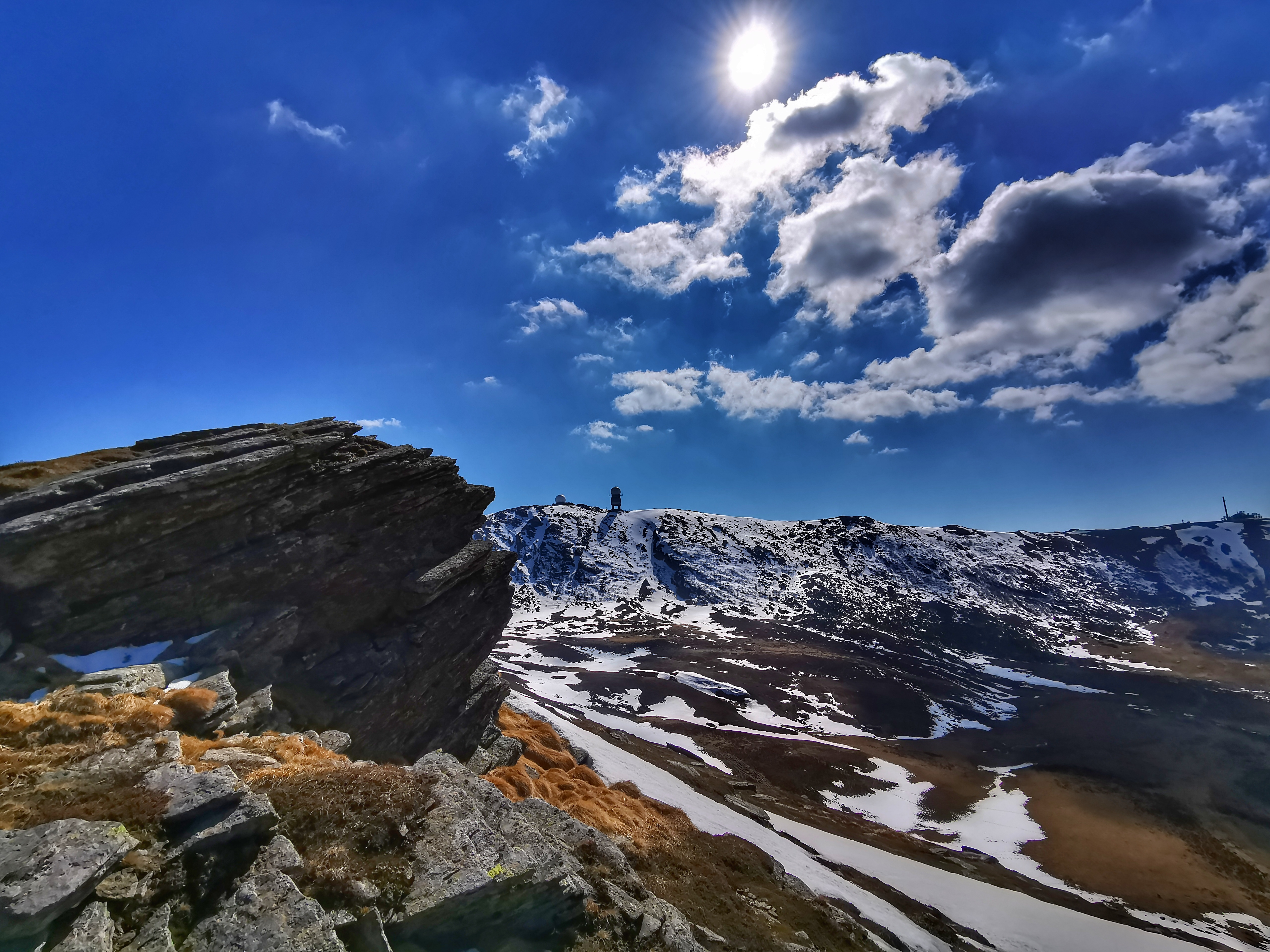 Die Goldhaube auf der Koralpe (Koralm)